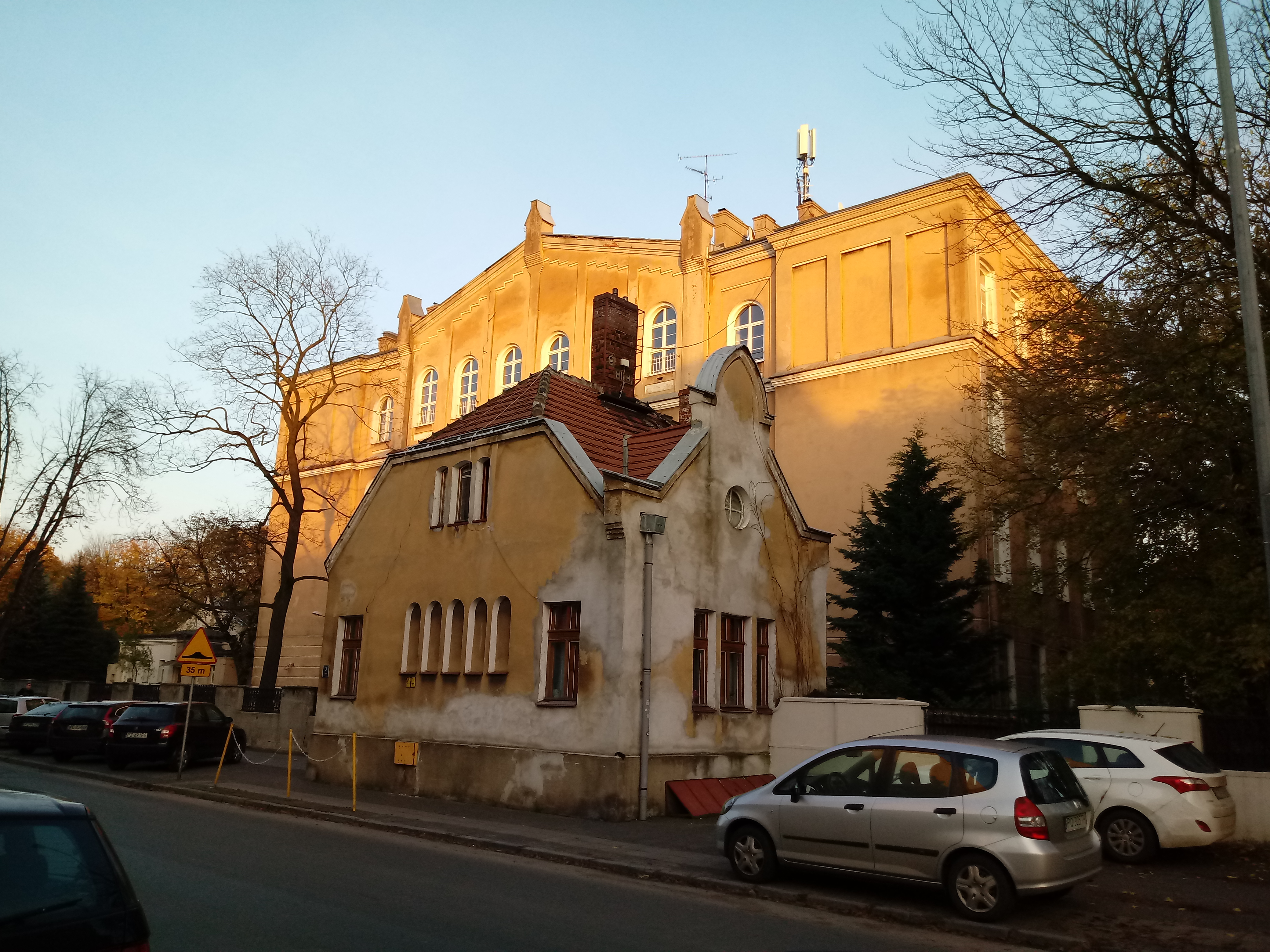 Domek woźnego przy Szkole Muzycznej, ul. Bydgoska w Poznaniu